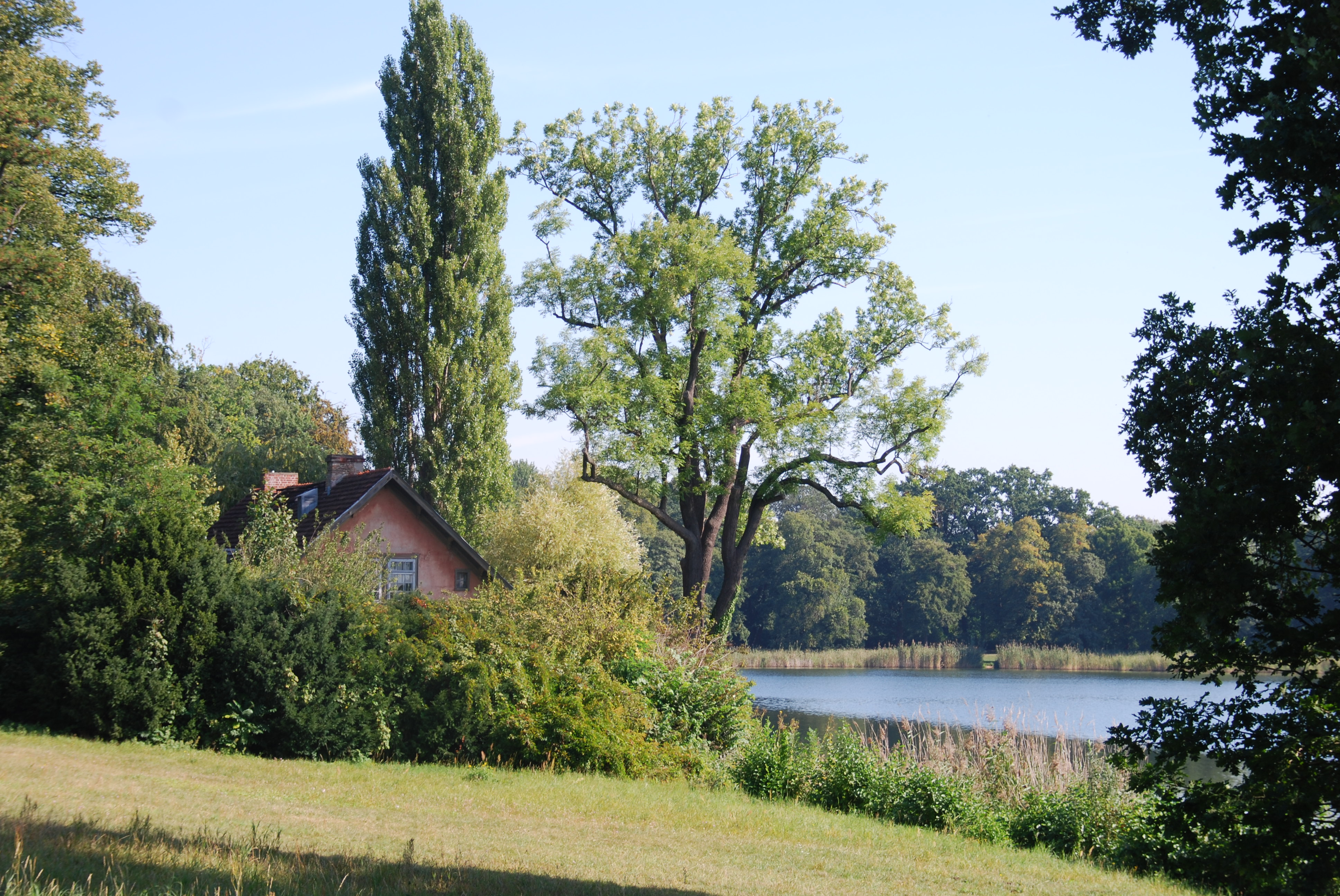 Das Rote Haus am Heiligen See in Potsdam